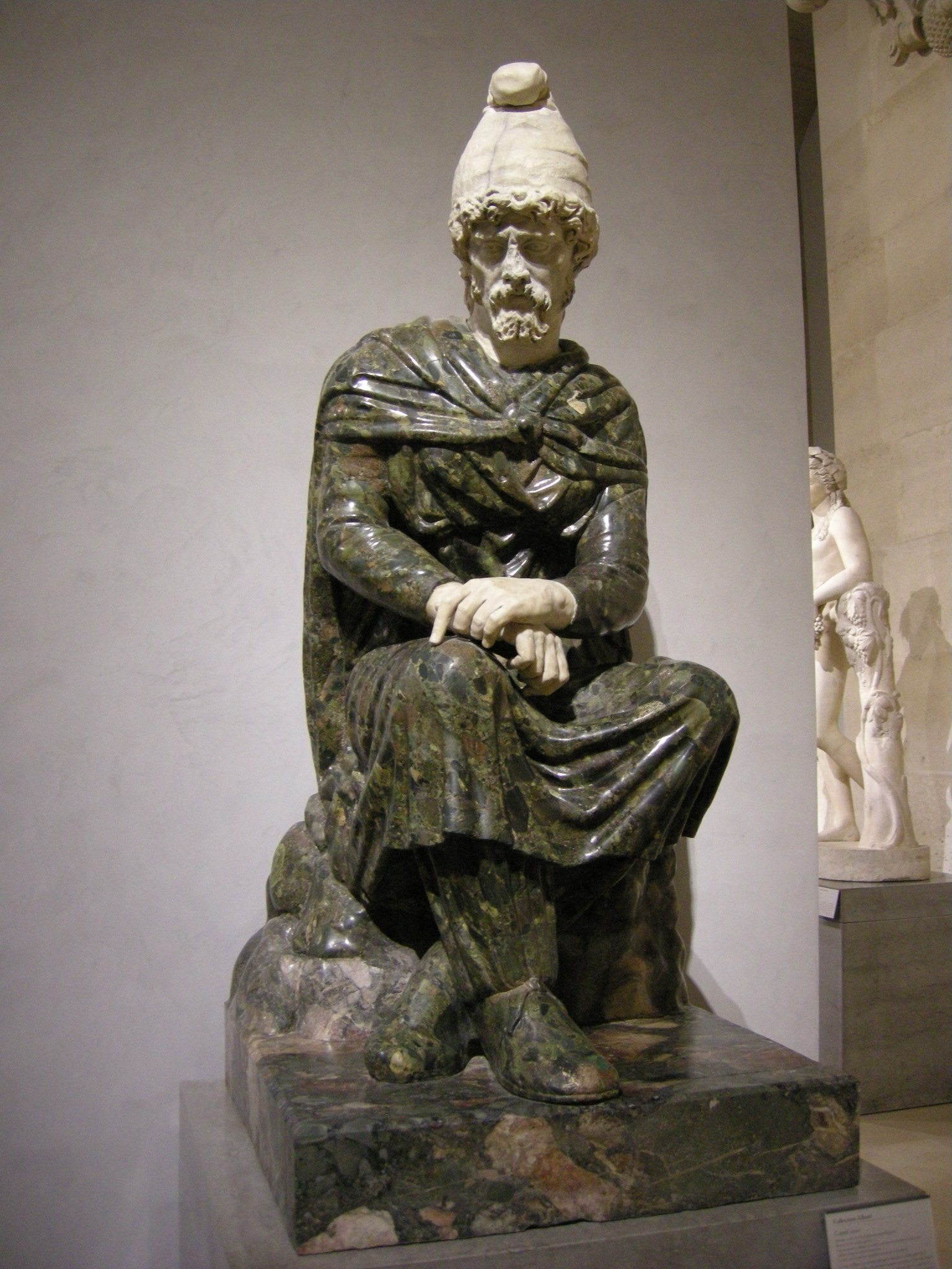 Prigioniero barbaro assiso da collezione albani, I-II sec. dc. 01.JPG